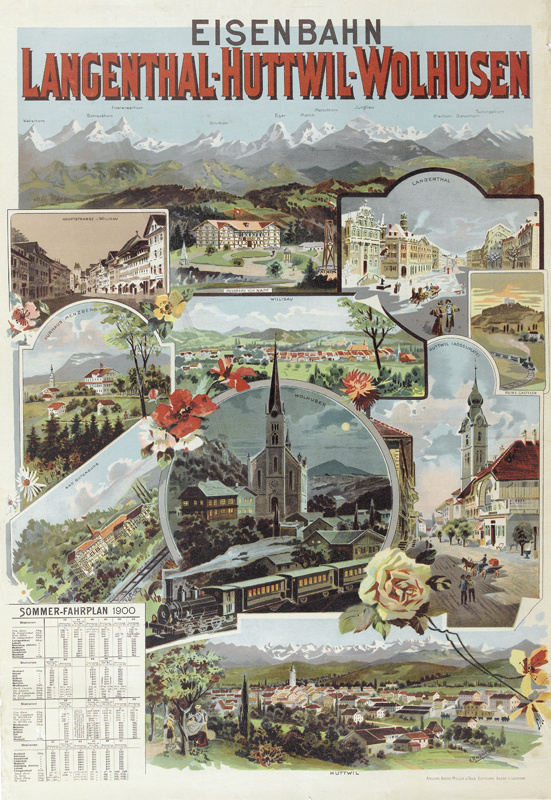 Langenthal-Huttwil-Wollhusen